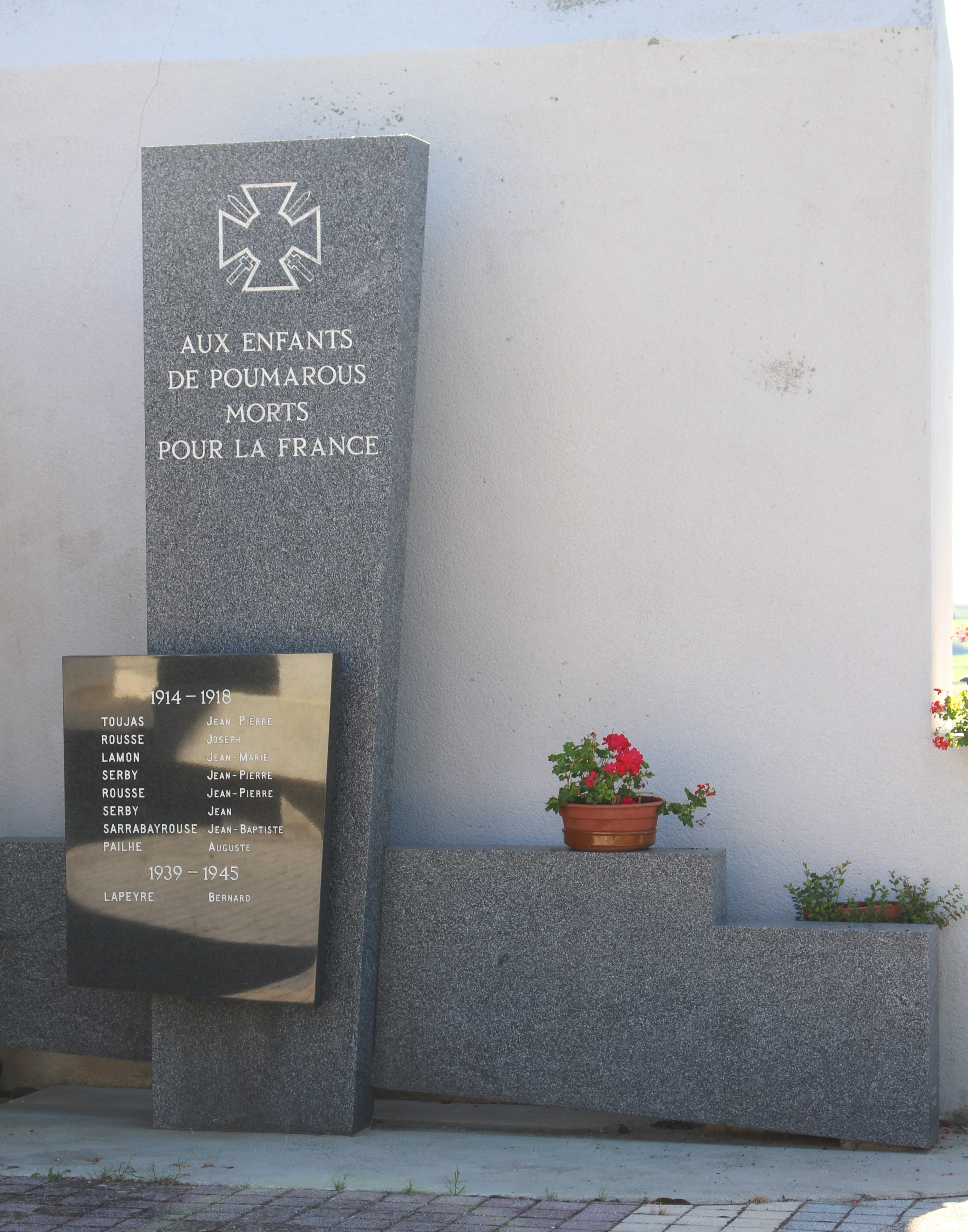 Monument aux morts de Poumarous (Hautes-Pyrénées)